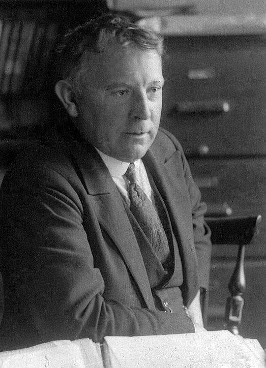 portrett, mann, høyesterettsadvokat, politiker, sittende halvfigur.